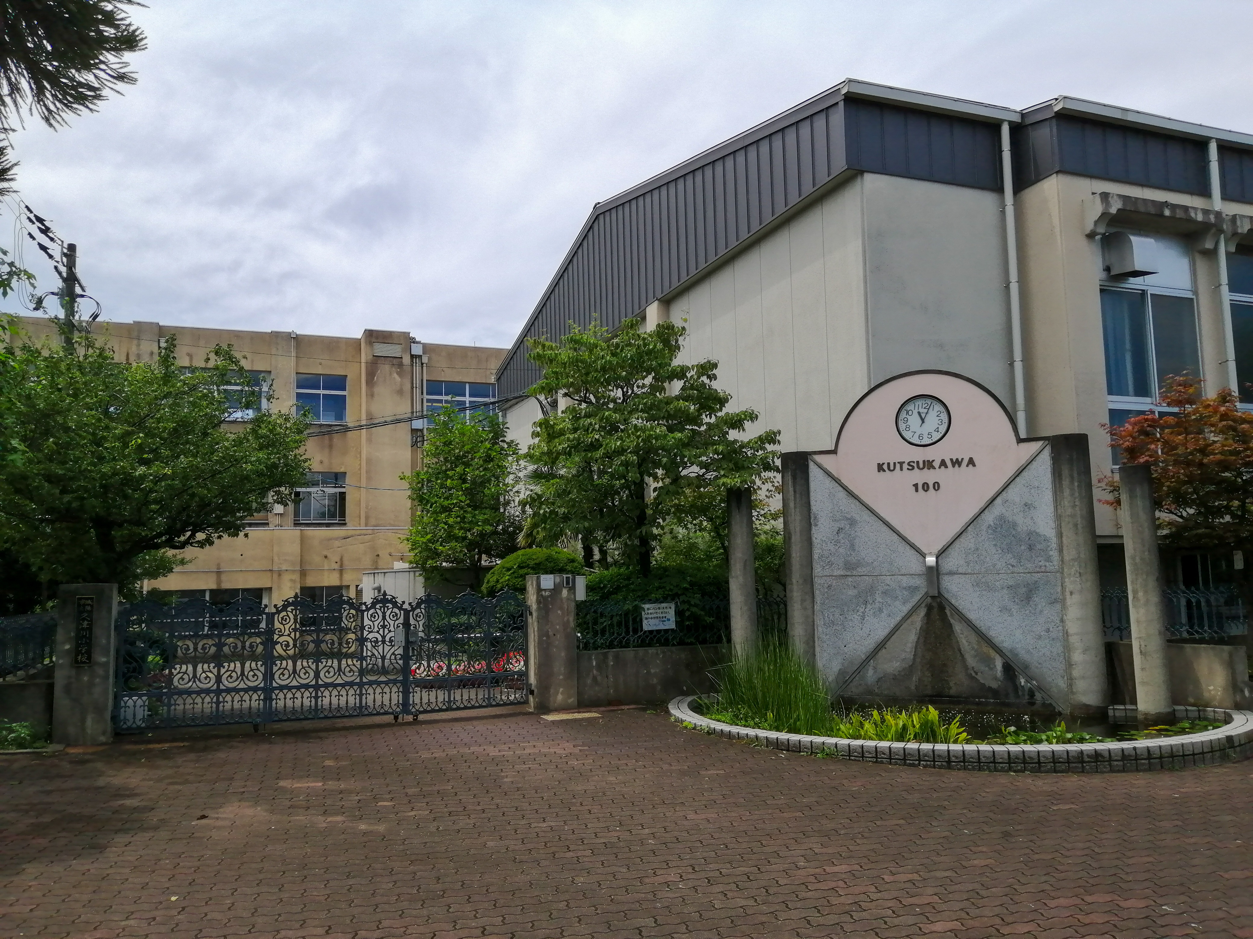 城陽市立久津川小学校の北門